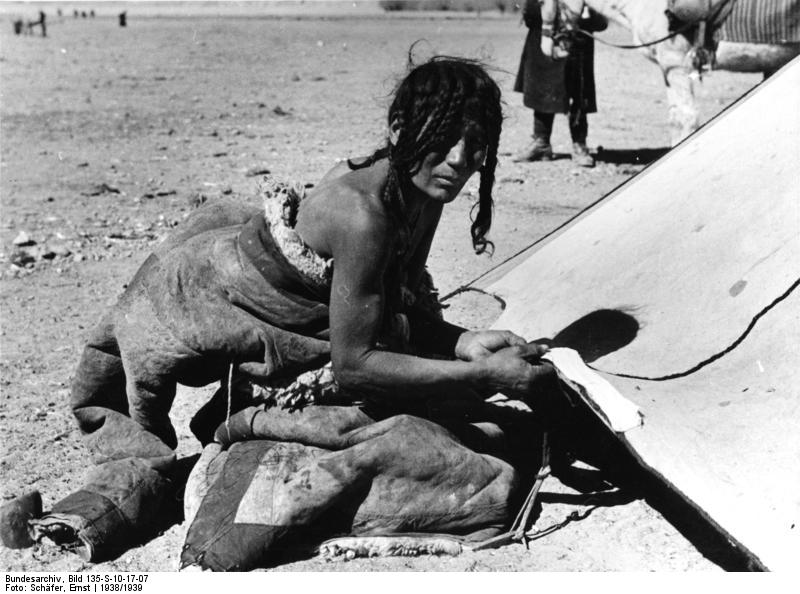 Lhasa, Ngoloklager, Nomade